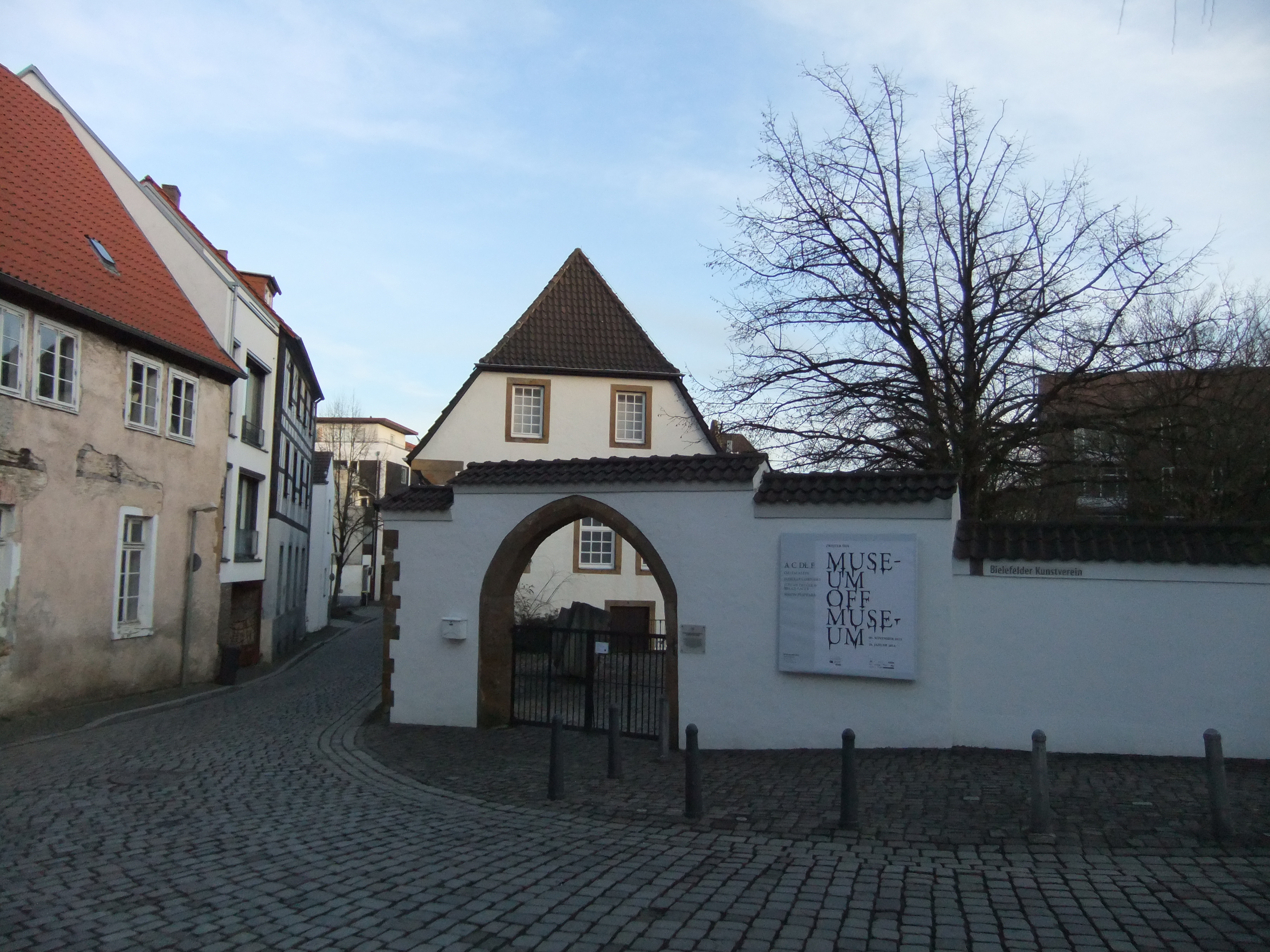 Museumsverein am Waldhof Bielefeld.